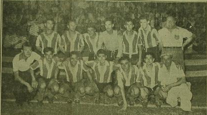 Equipo de Unión de Santa Fe que formo en 1955